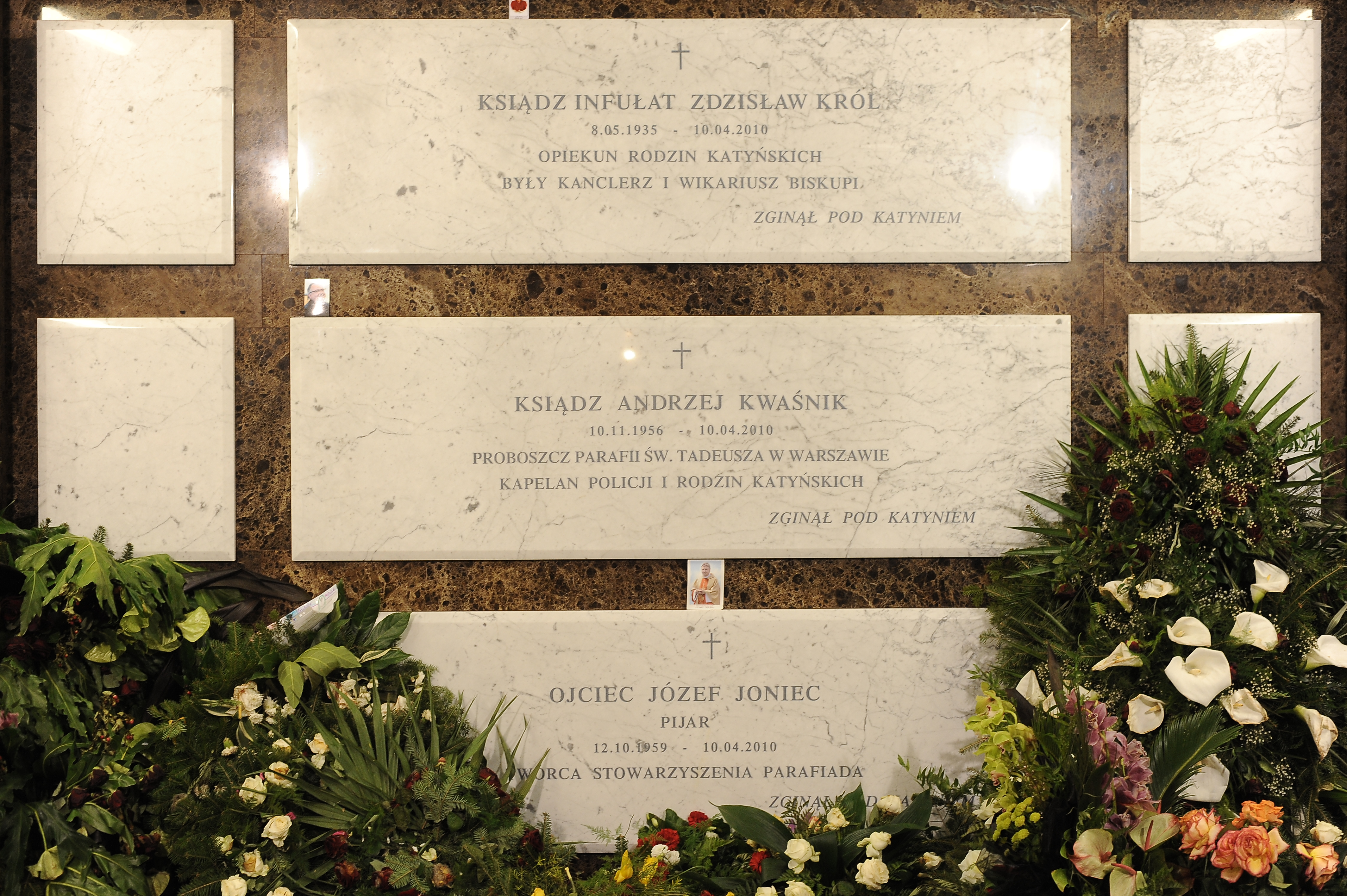 Krypty księdza infułata Zdzisława Króla, księdza Andrzeja Kwaśnika i ojca Józefa Jońca w Panteonie Wielkich Polaków Świątyni Opatrzności Bożej w Warszawie